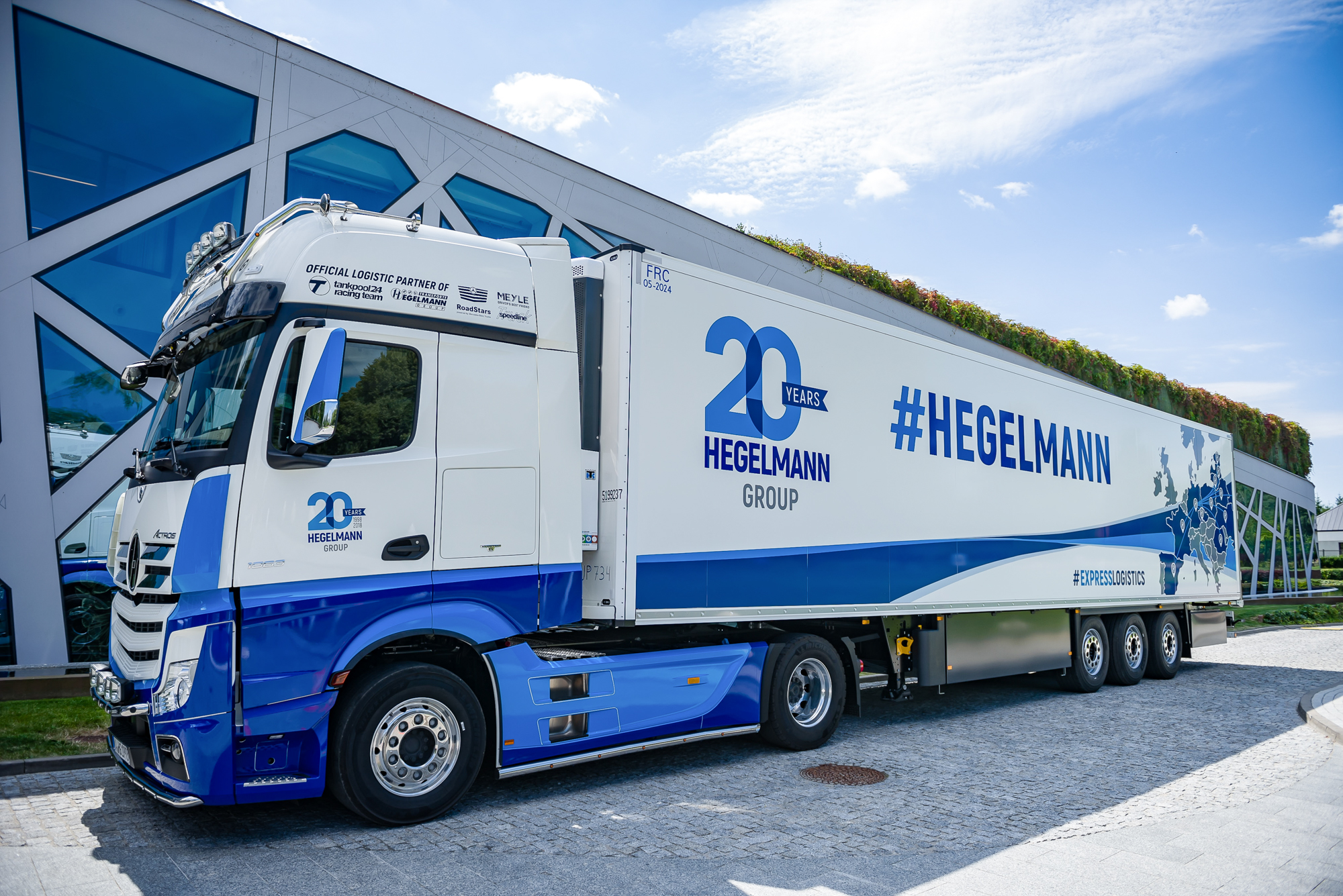 Hegelmann 20 Jahre Jubiläumstruck